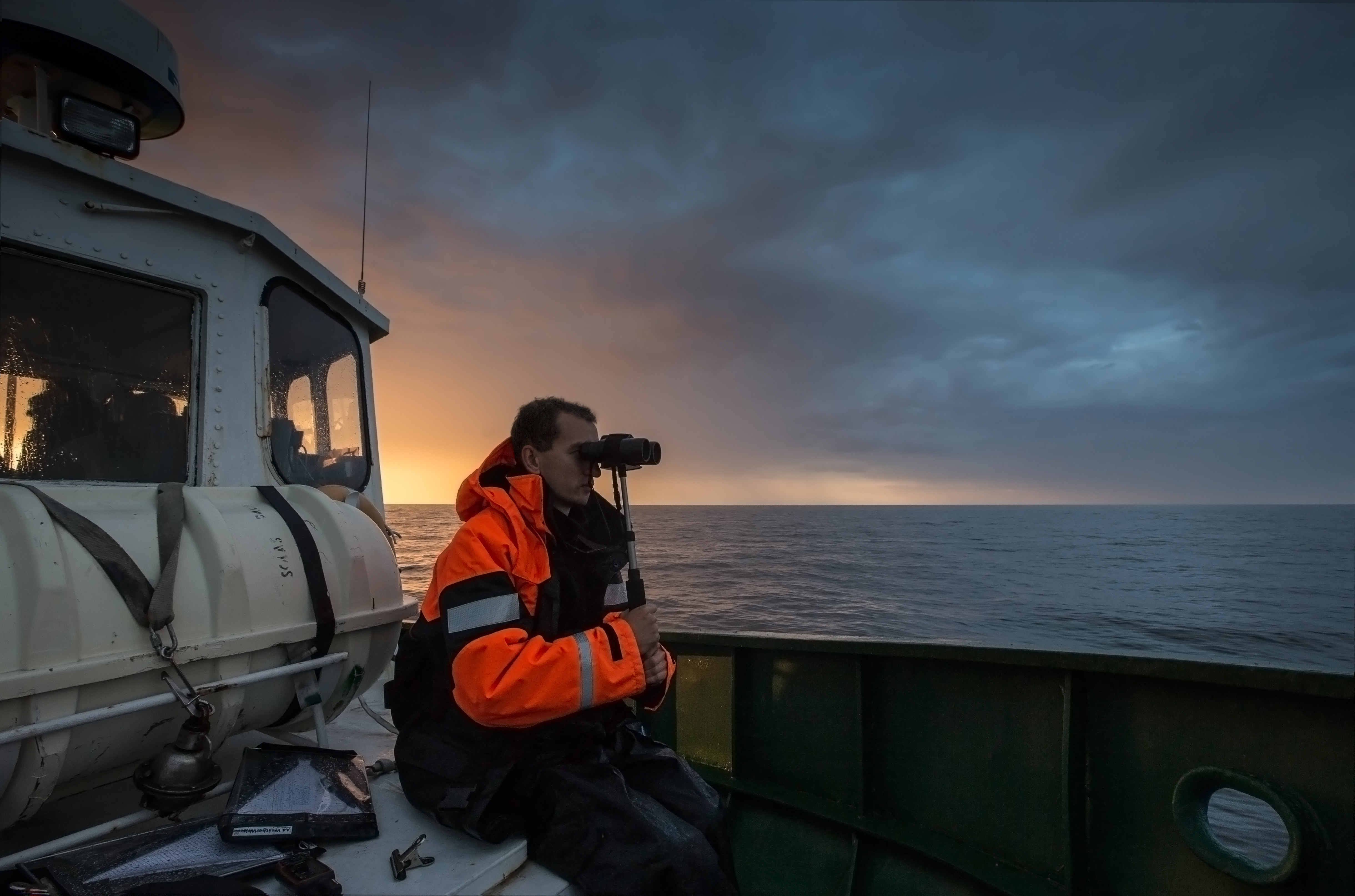 Ornitoloog Tarvo Valker osalemas TÜ Eesti Mereinstituudi korraldataval merelinnustiku laevaloendusel Kihnu merepiirkonnas. Eesti Energia AS tellitava uurimistöö ülesandeks on välja selgitada tuuleenergeetika arendamise võimalused Kihnu merepiirkonnas.